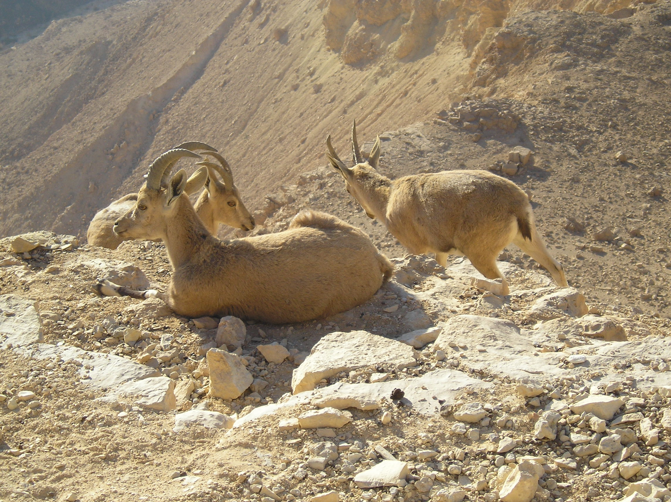 Nubian Ibex in Negev